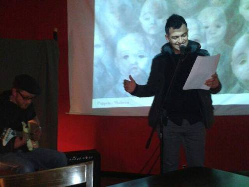 Pablo Jofré durante un conversatorio de poesía.